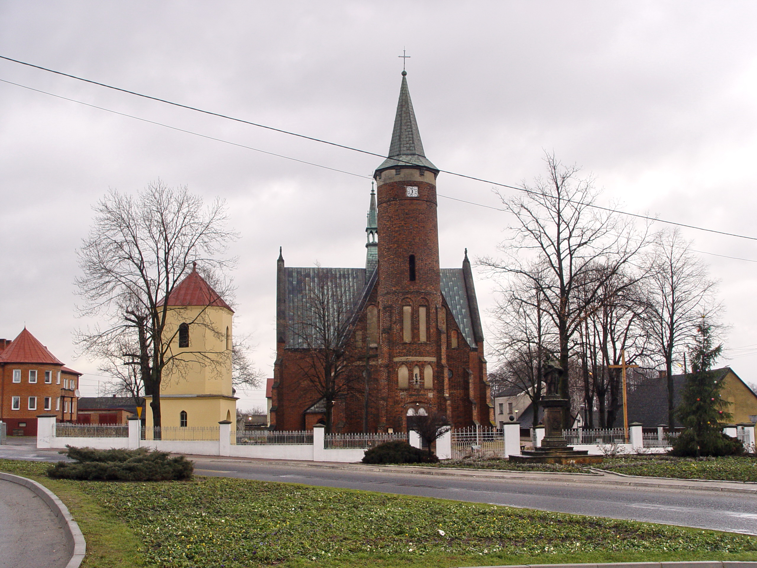 Drzewica, kościół św.Łukasza - wschodnia część miejskiego rynku.